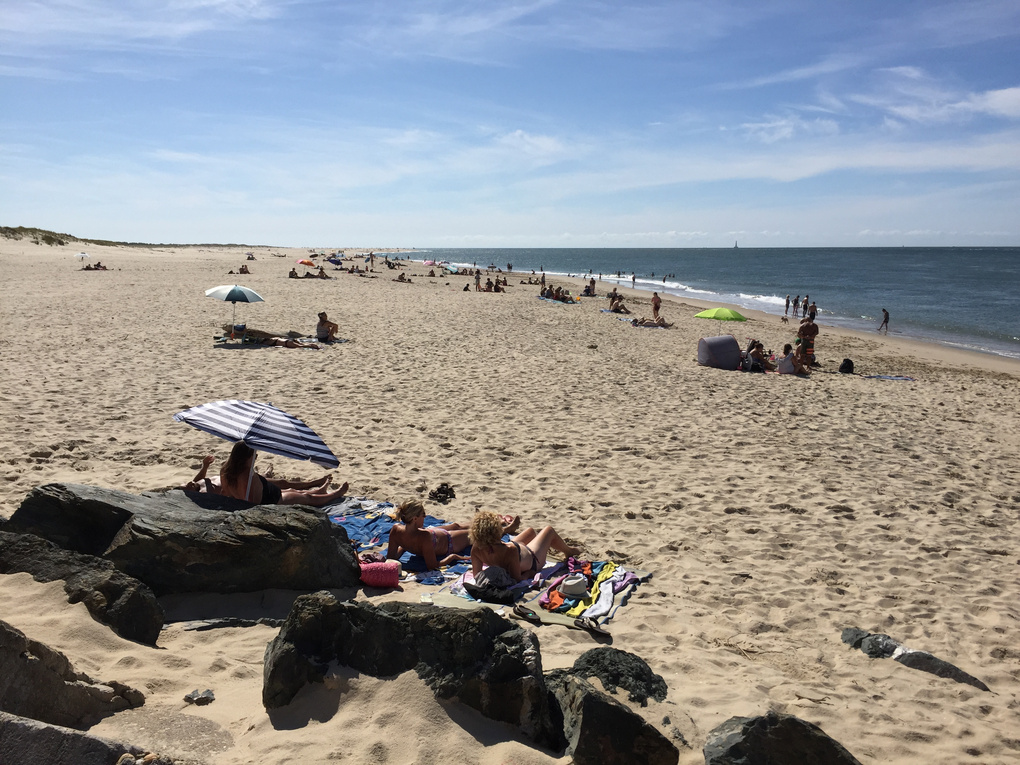 Profitant de l'ensablement, les touristes investissent le bout de la pointe afin de s'y baigner côté océan